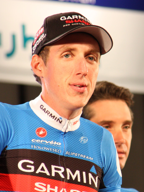 Utsunomiya 19/Oct/2012